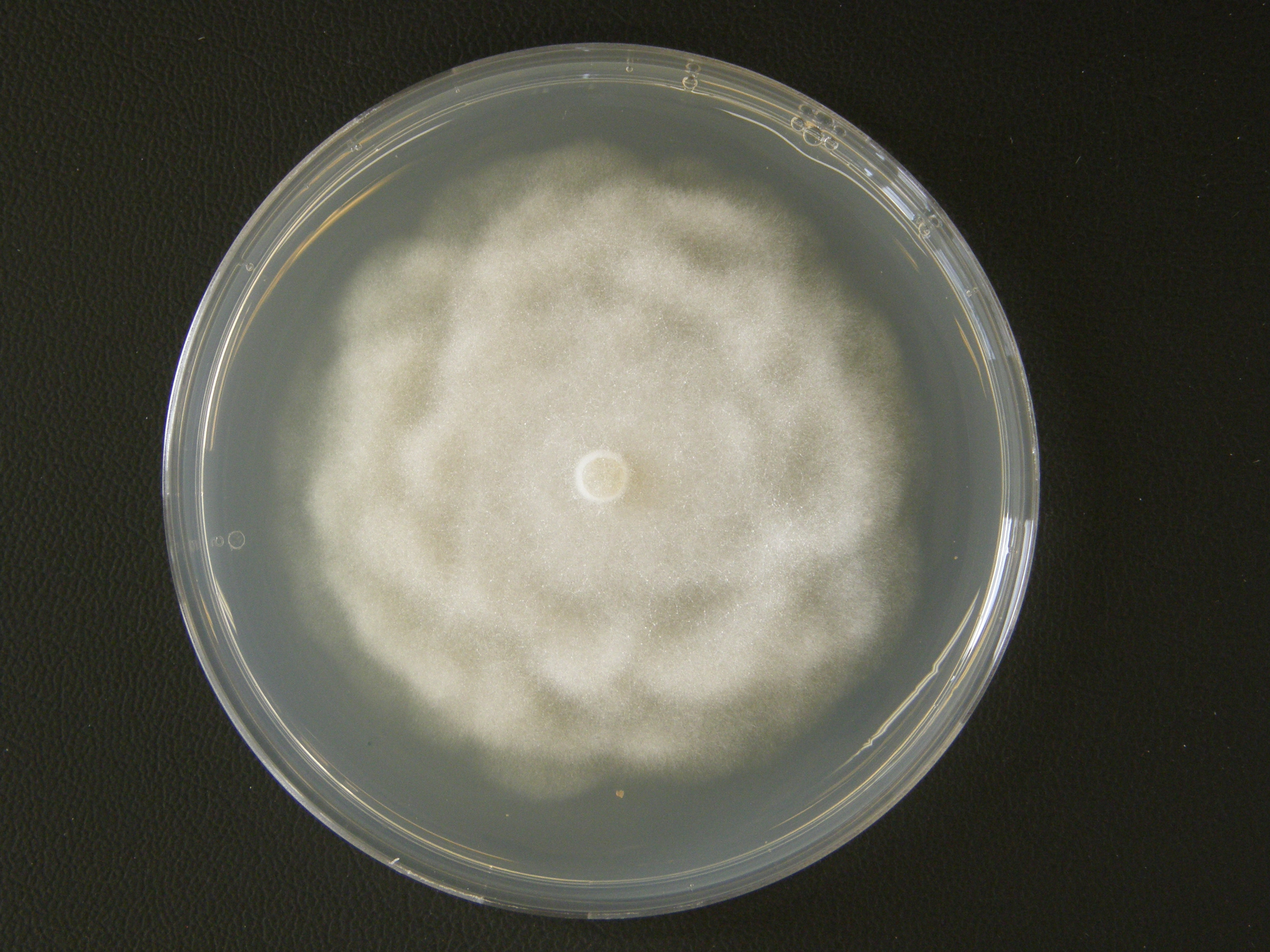 P. cryptogea colony on PDA (foto K. Černý)